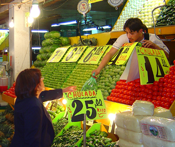 Comercio en la Central de Abastos